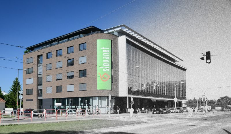 Sídlo spoločnosti Slovanet na Záhradníckej 151, Bratislava